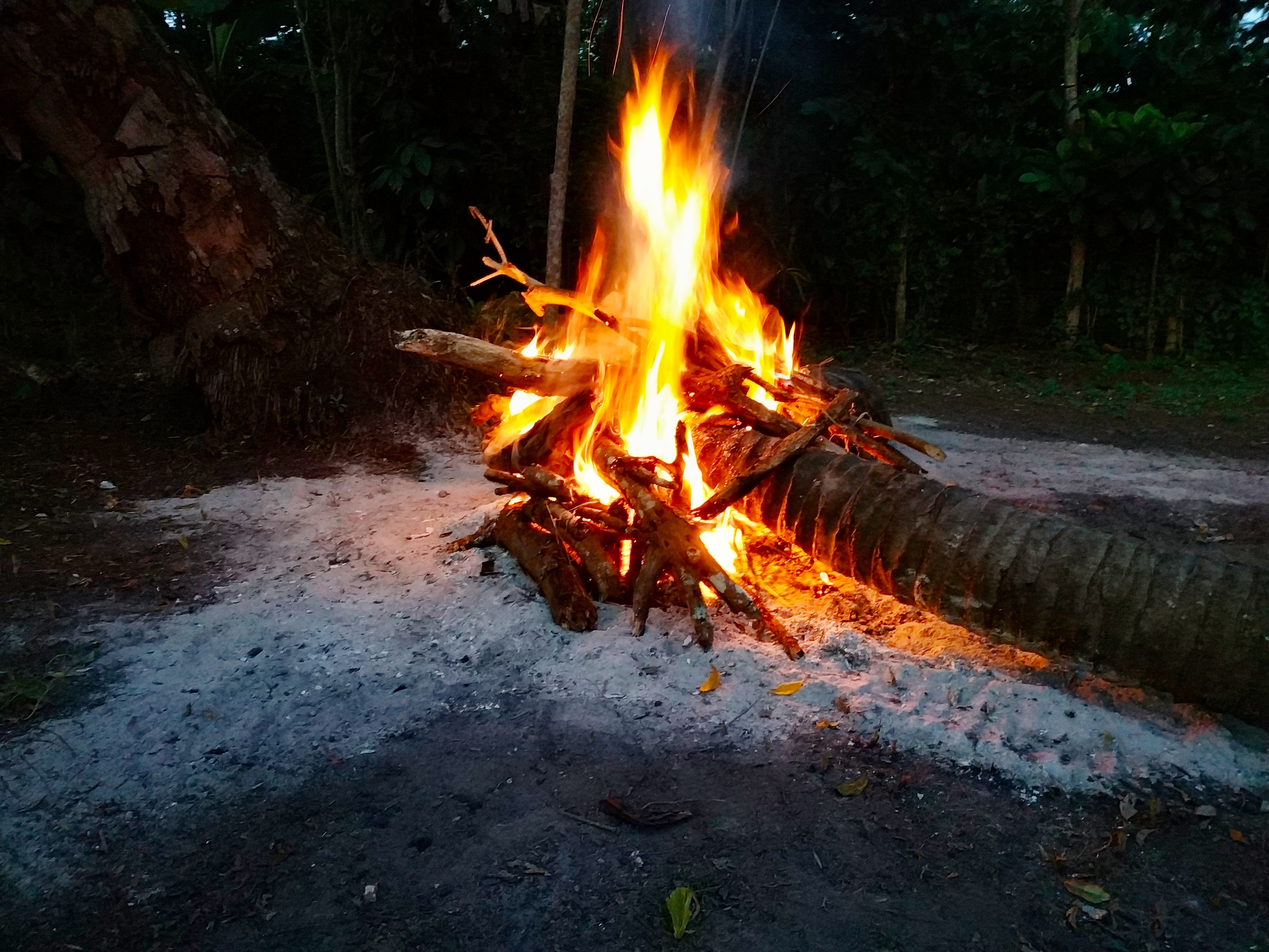 Api yang membara menghanguskan benda menjadi abu secara sempurna.